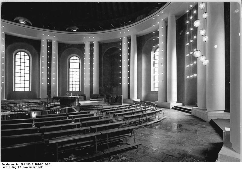 Zentralbild Repro 1.11.1963 St. Hedwigs-Kathedrale in Berlin UBz: Innenansicht der am 1.11.1963 wiedergeweihten Kirche. Diese 1943 fast völlig zerstörte Kirche, wurde mit Unterstützung der Regierung der DDR, die eine halbe Million DM zur Verfügung stellte, seit 1952 in mühevoller Arbeit wiederaufgebaut.